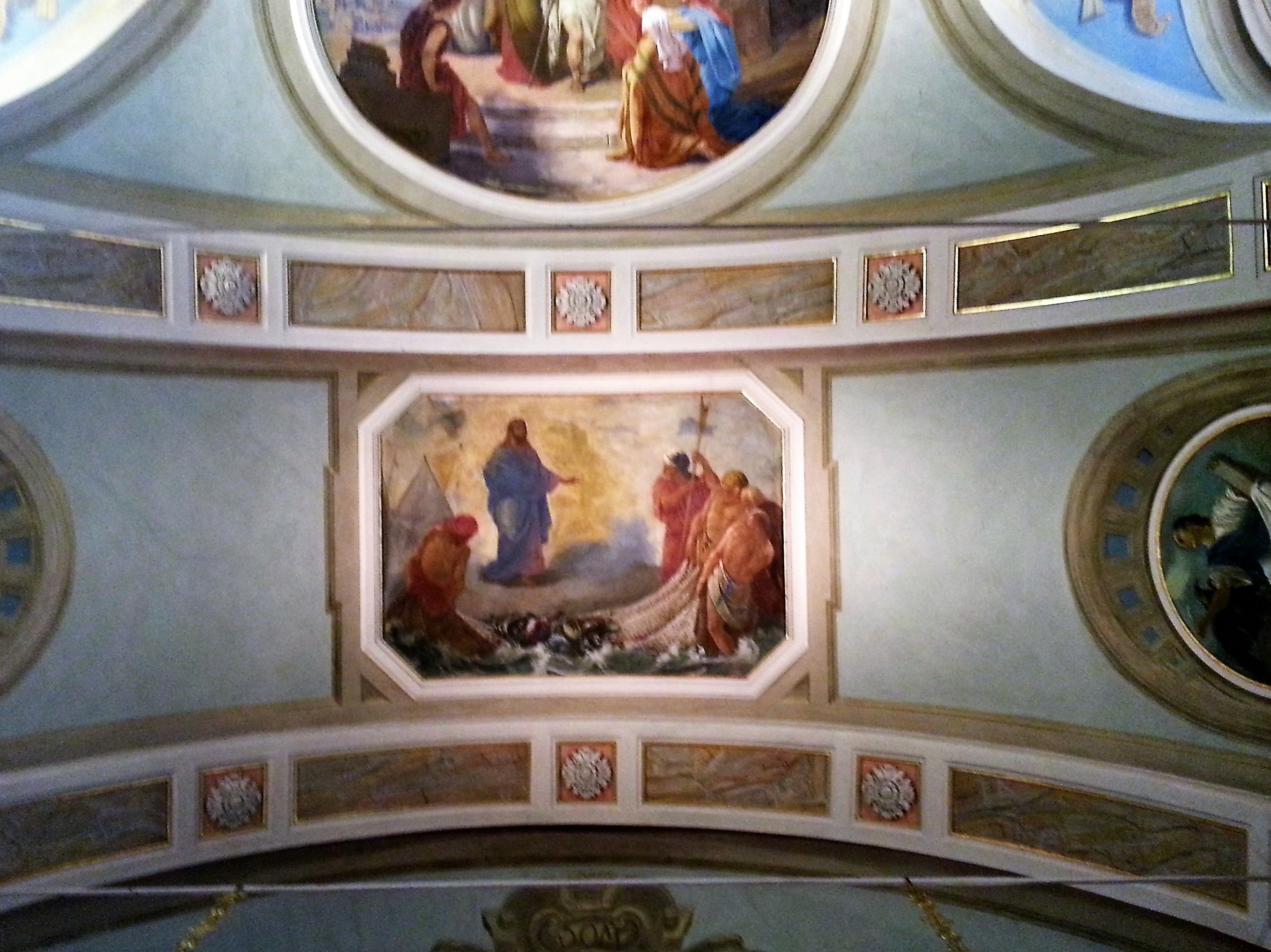 Pitture sulla volta della chiesa di san Pieto e Paolo